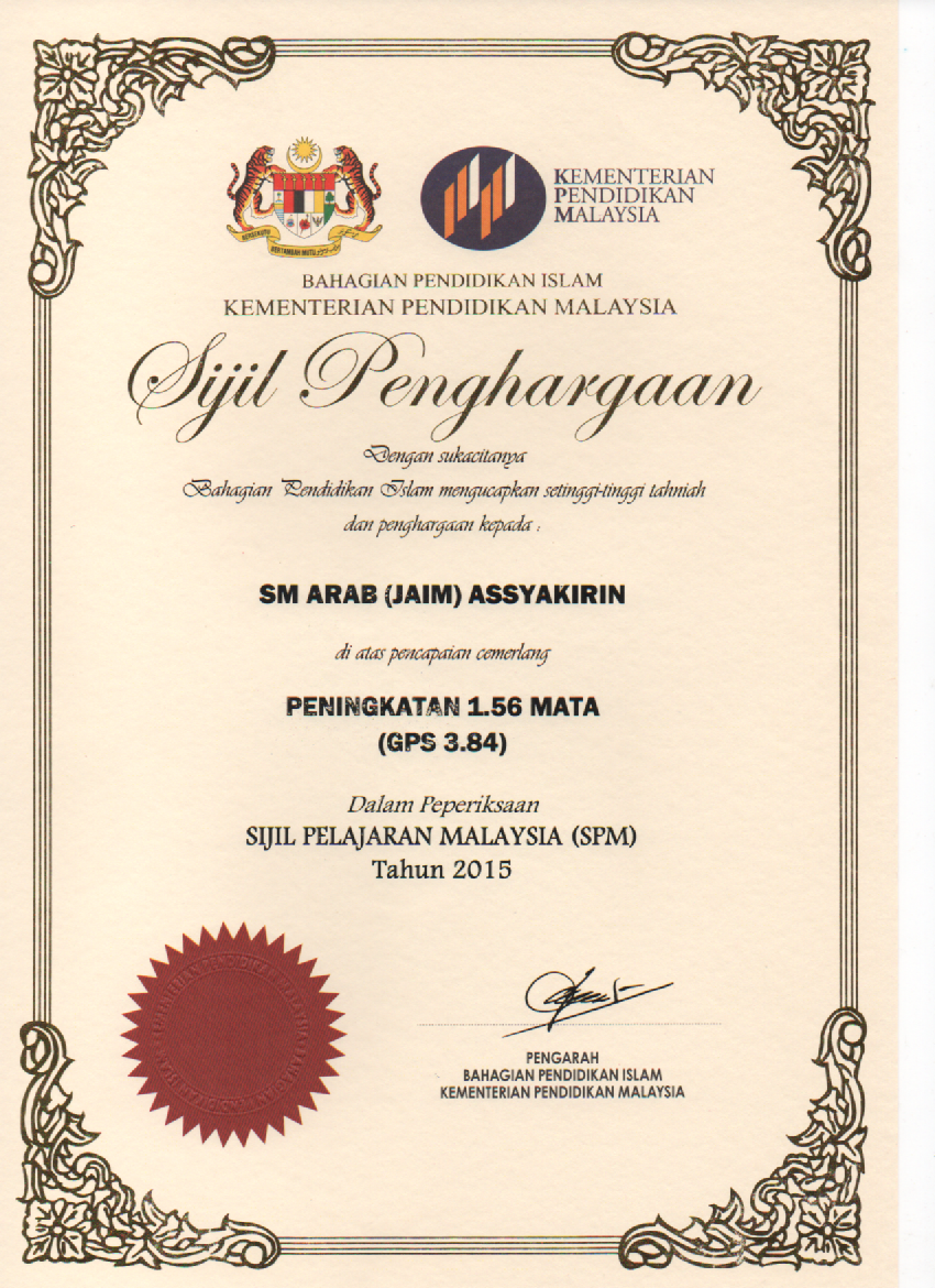 Sijil Penghargaan Cemerlang SPM 2015